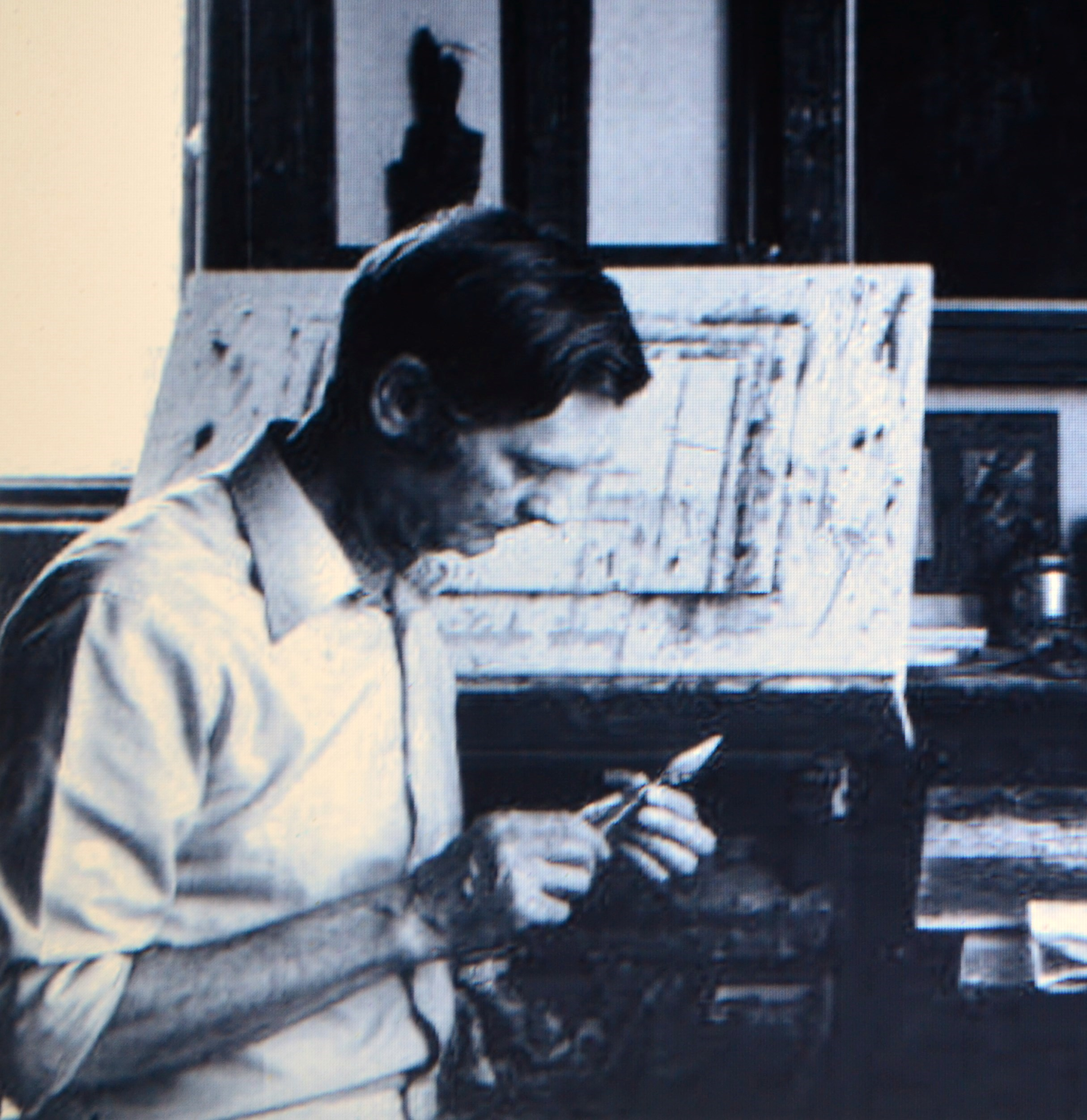 Gianetto Biondini nel suo studio